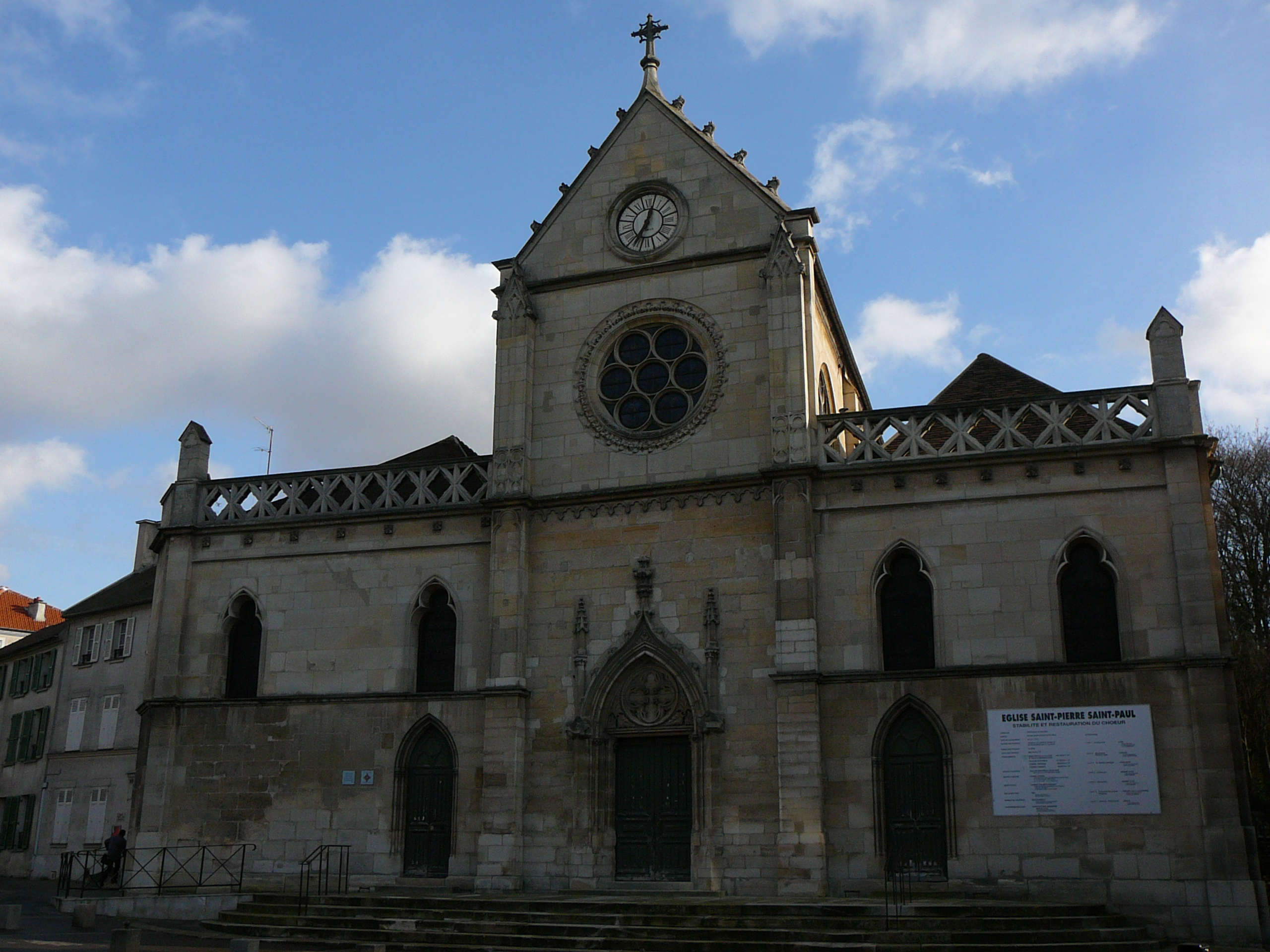 Église Saint-Pierre-Saint-Paul de Montreuil, France